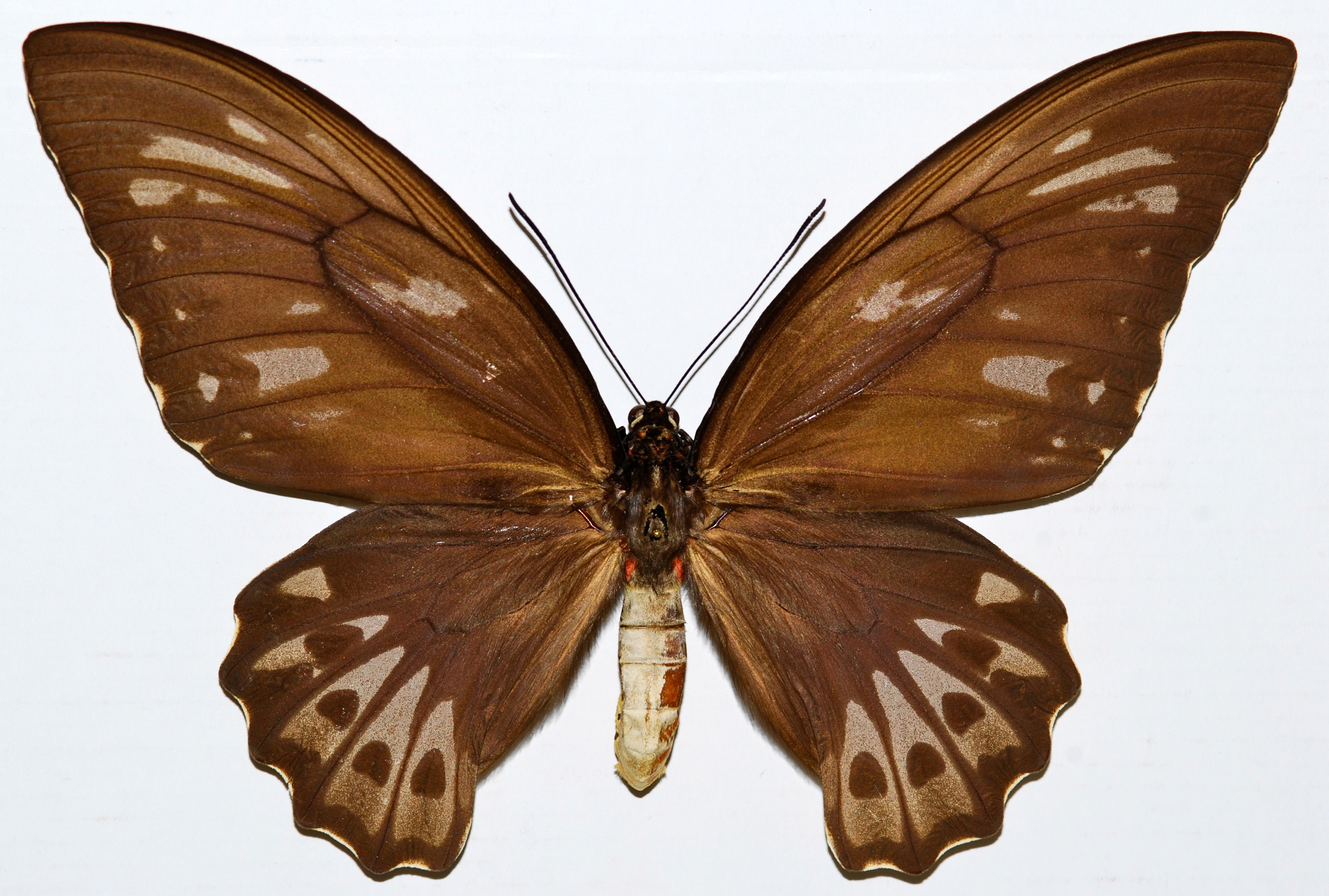 Ornithoptera priamus urvillianus female. Halmahera, Maluku, INDONESIA